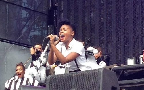 Janelle Monae. Made in america 2012. September 2012. Philadelphia.